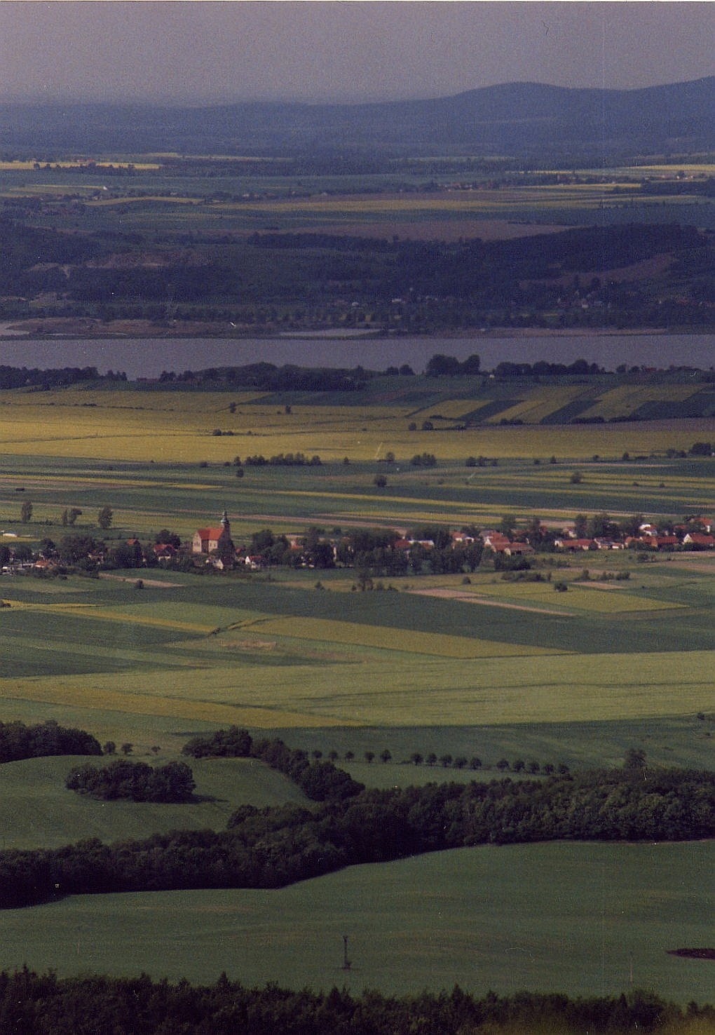 Widok na centralną cześć kamienicy z kościołem Sw. Jerzego ze szczytu Wyskoki Kamień.